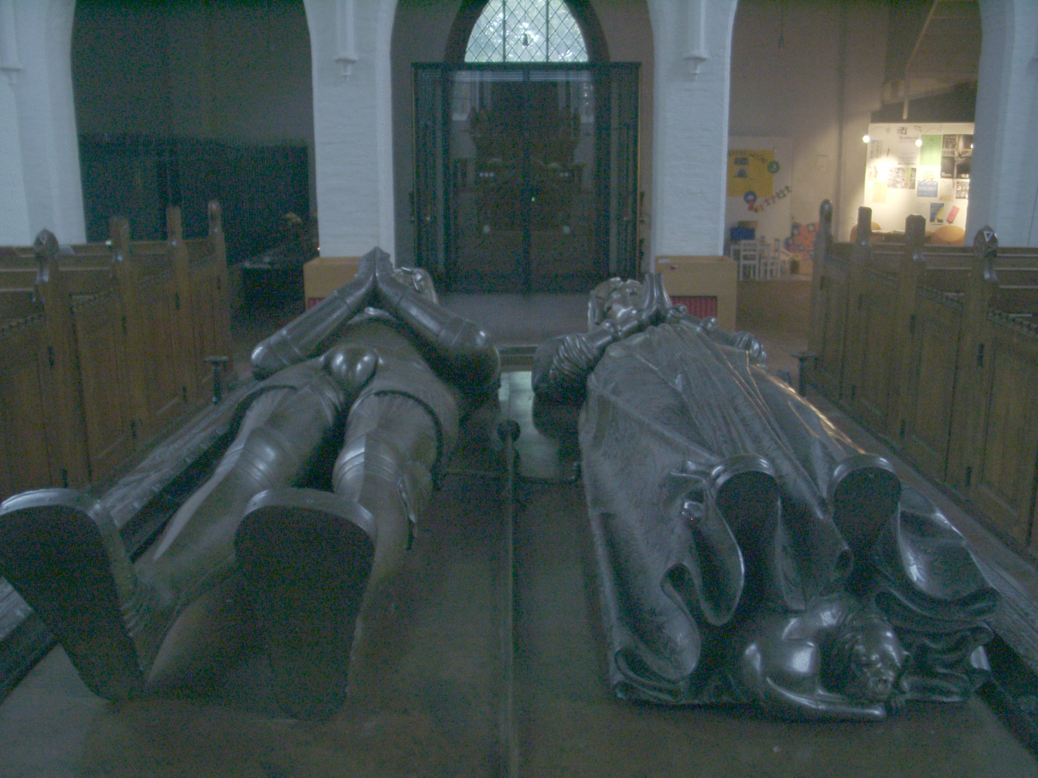 Klosterkirche Bordesholm Images from Wiki Loves Monuments 2011, DE-SH Kloster Bordesholm